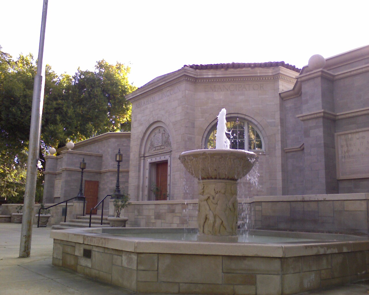 In Redlands